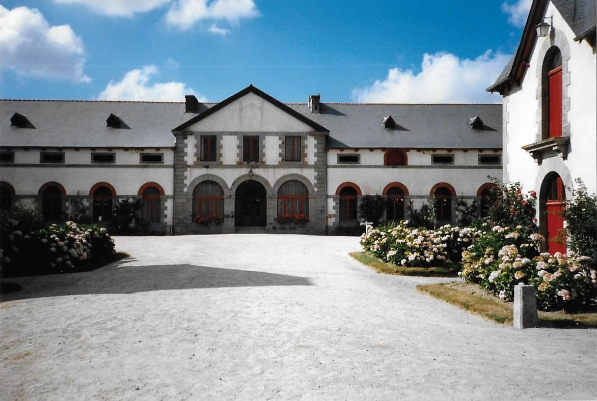 Haras national de Lamballe, Côtes-d'Armor, Bretagne, France .